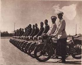 motorizirani odred Hrvatskog oružništva